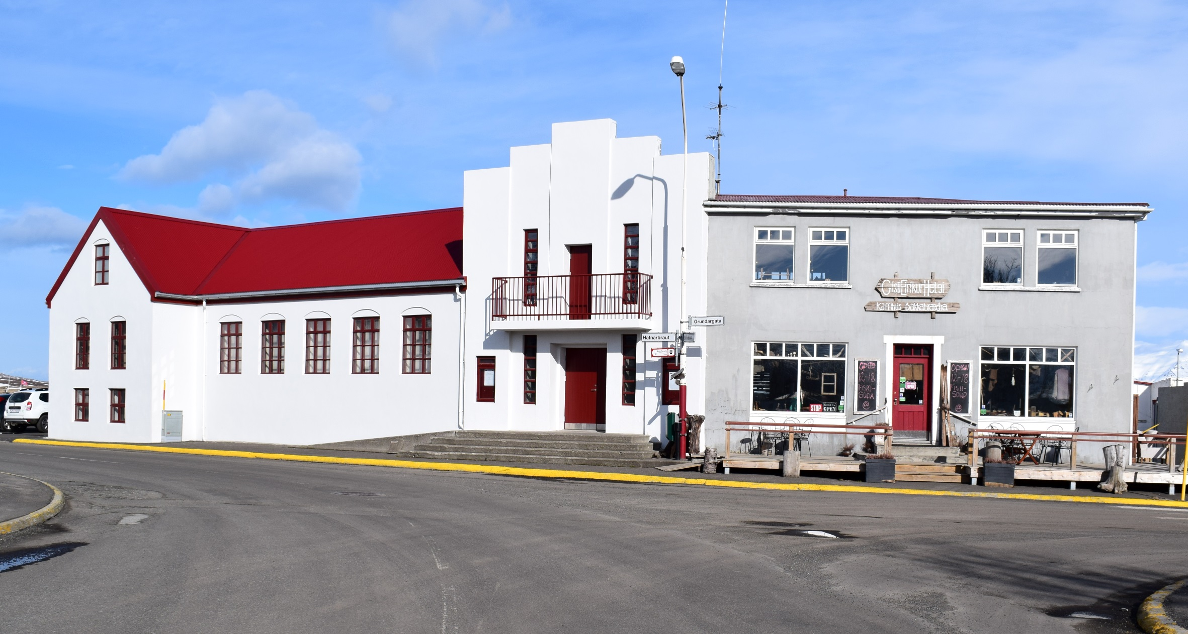 Úngó, aðsetur Leikfélags Dalvíkur